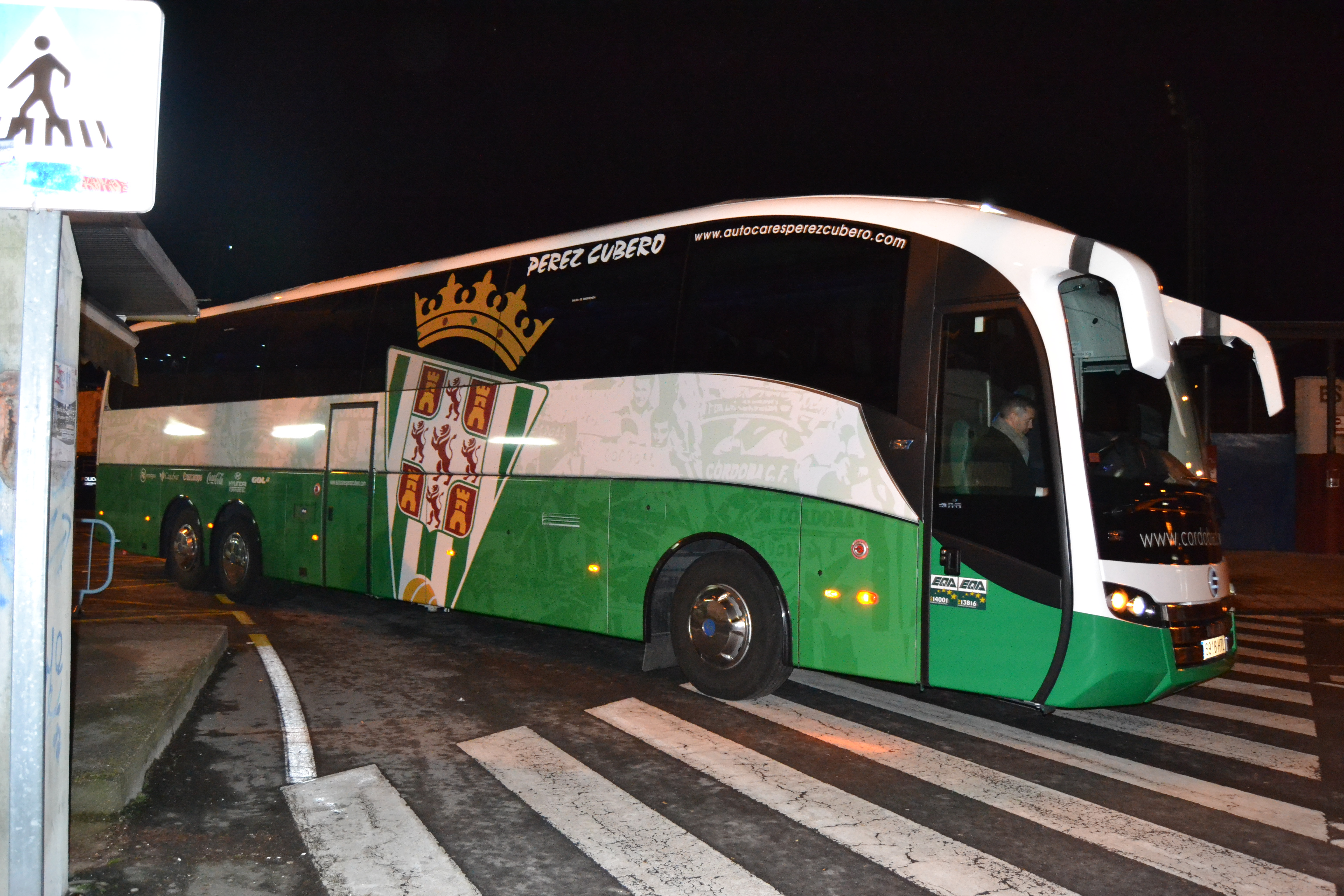 O autobús do Córdoba CF